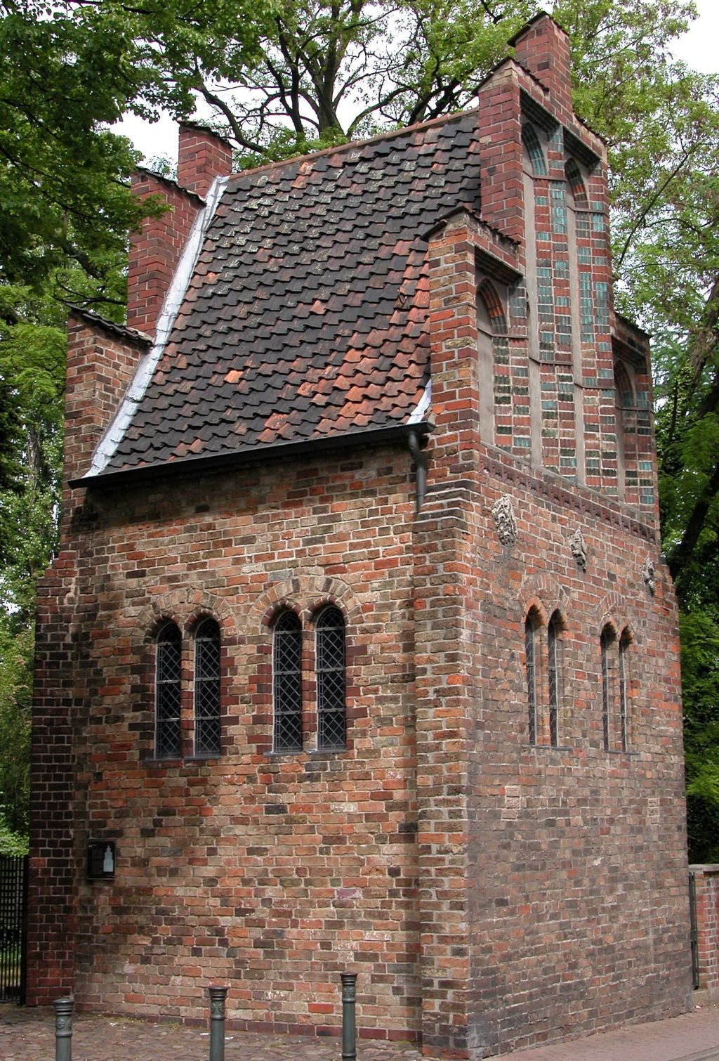 Braunschweig: Liberei, Gesamtansicht von Südwesten